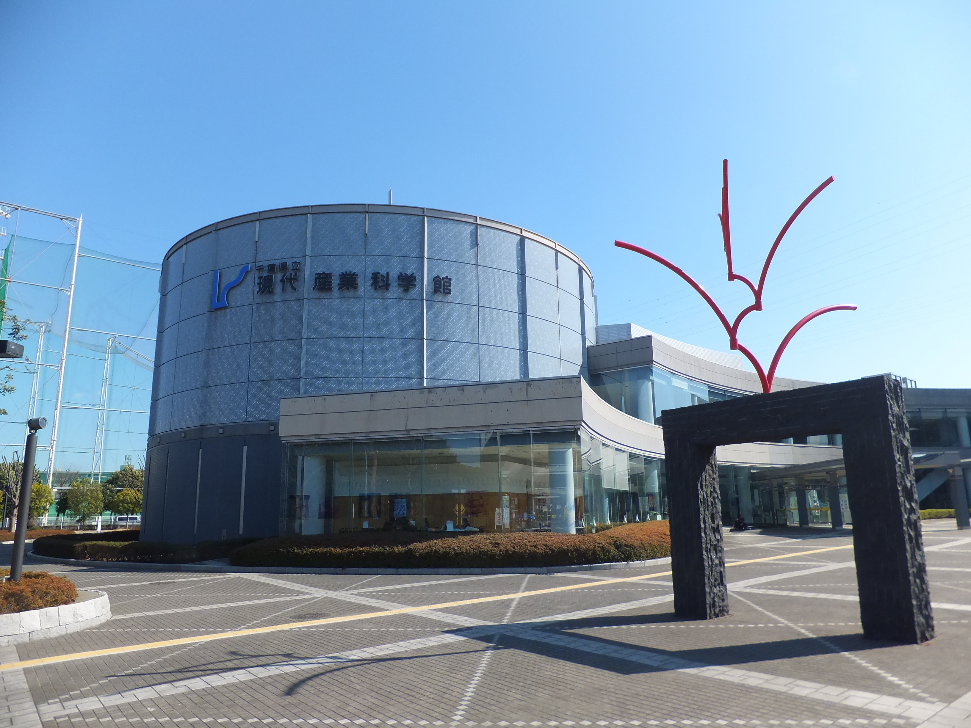 千葉県立現代産業科学館